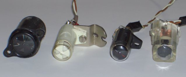 Verschiedene Sternschauzeichen, von links nach rechts neuer werdend.